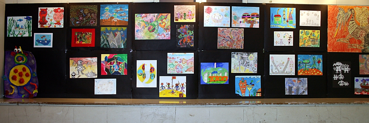 Izložba crteža na SFeraKonu u Zagrebu